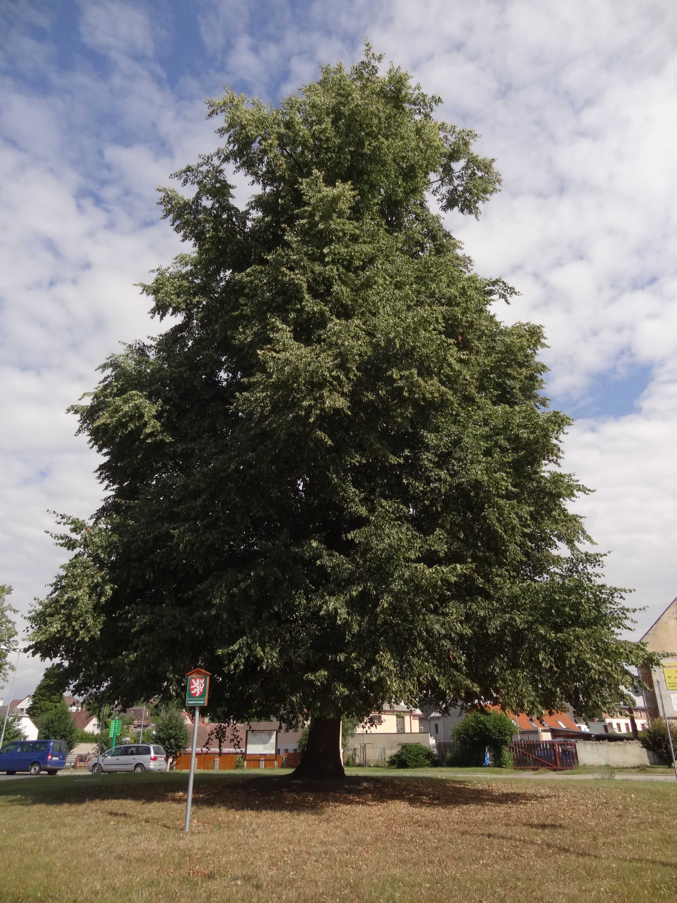 Památná lípa Skautů na trávníku uprostřed autobusového nádraží v Chrastavě